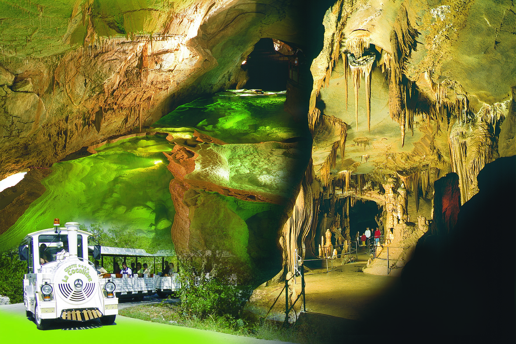 Grotte de la Cocalière avec retour en petit train